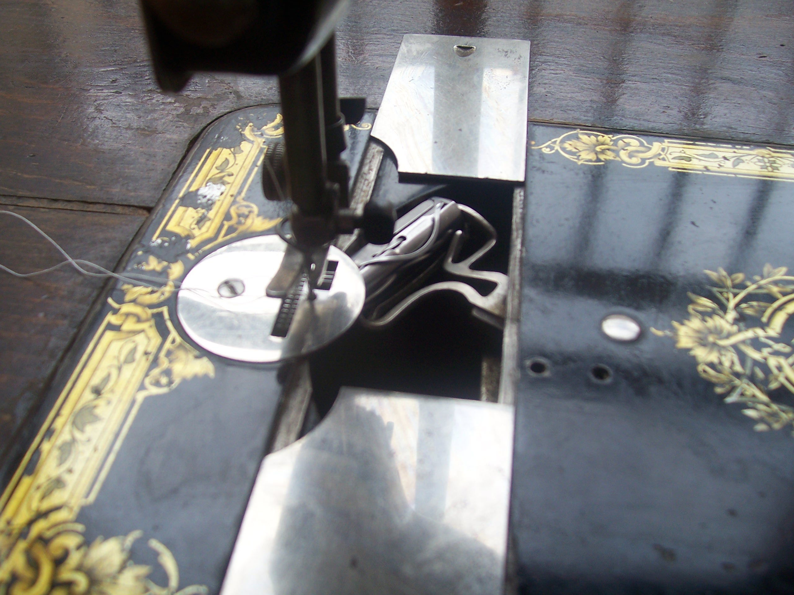 photo descriptive de machine à coudre Singer à navette